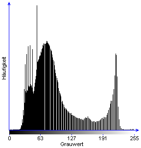 Histogramm